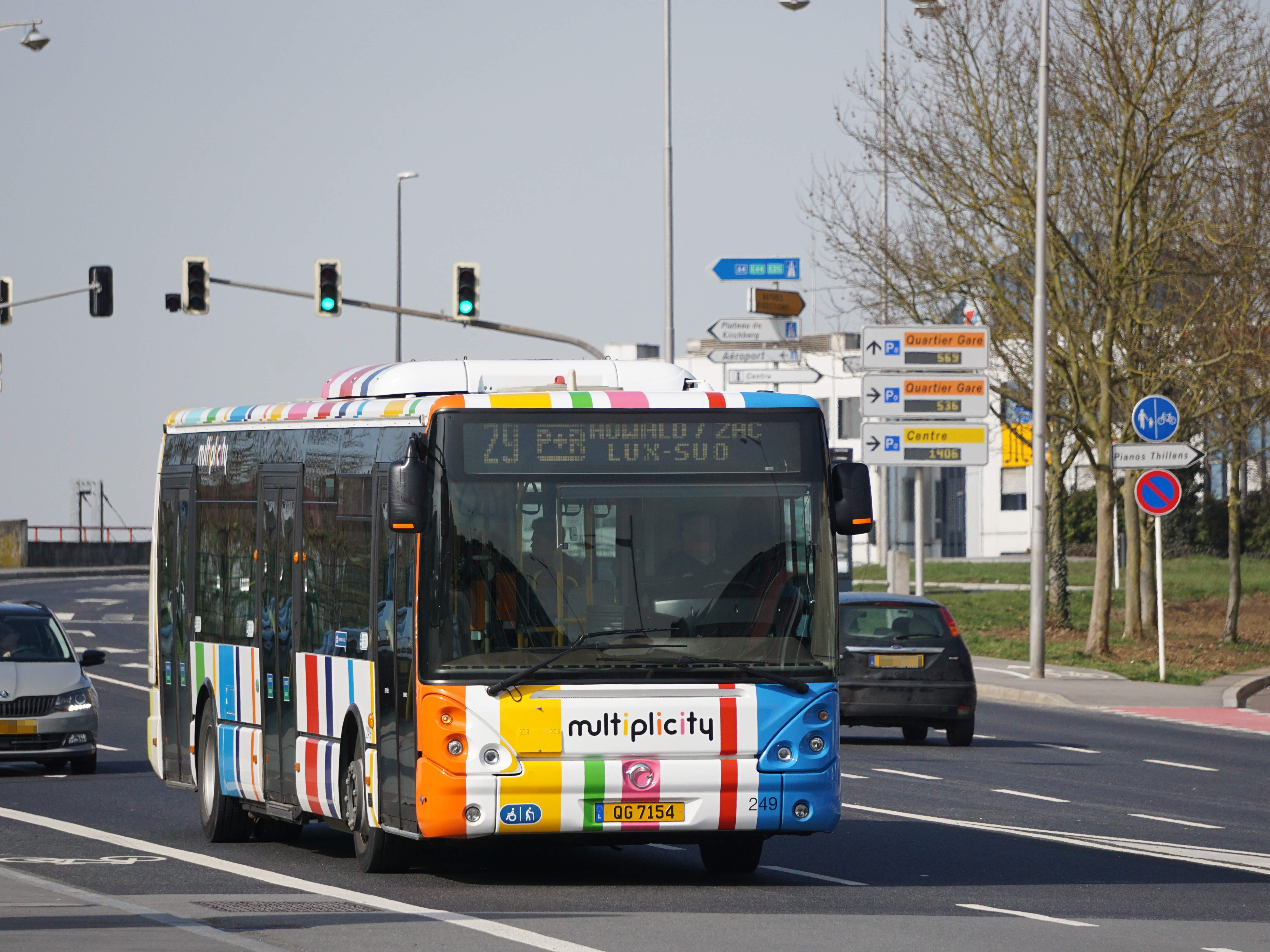 Bus AVL (Autobus de la Ville de Luxembourg) #249 (QG 7154). Marque: Irisbus Fiert an der Diddenuewener Strooss op der Linn 29 Richtung Howald, P+R Lux-Sud.